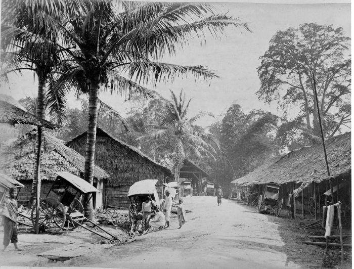 Foto. Kampong Lahlang.